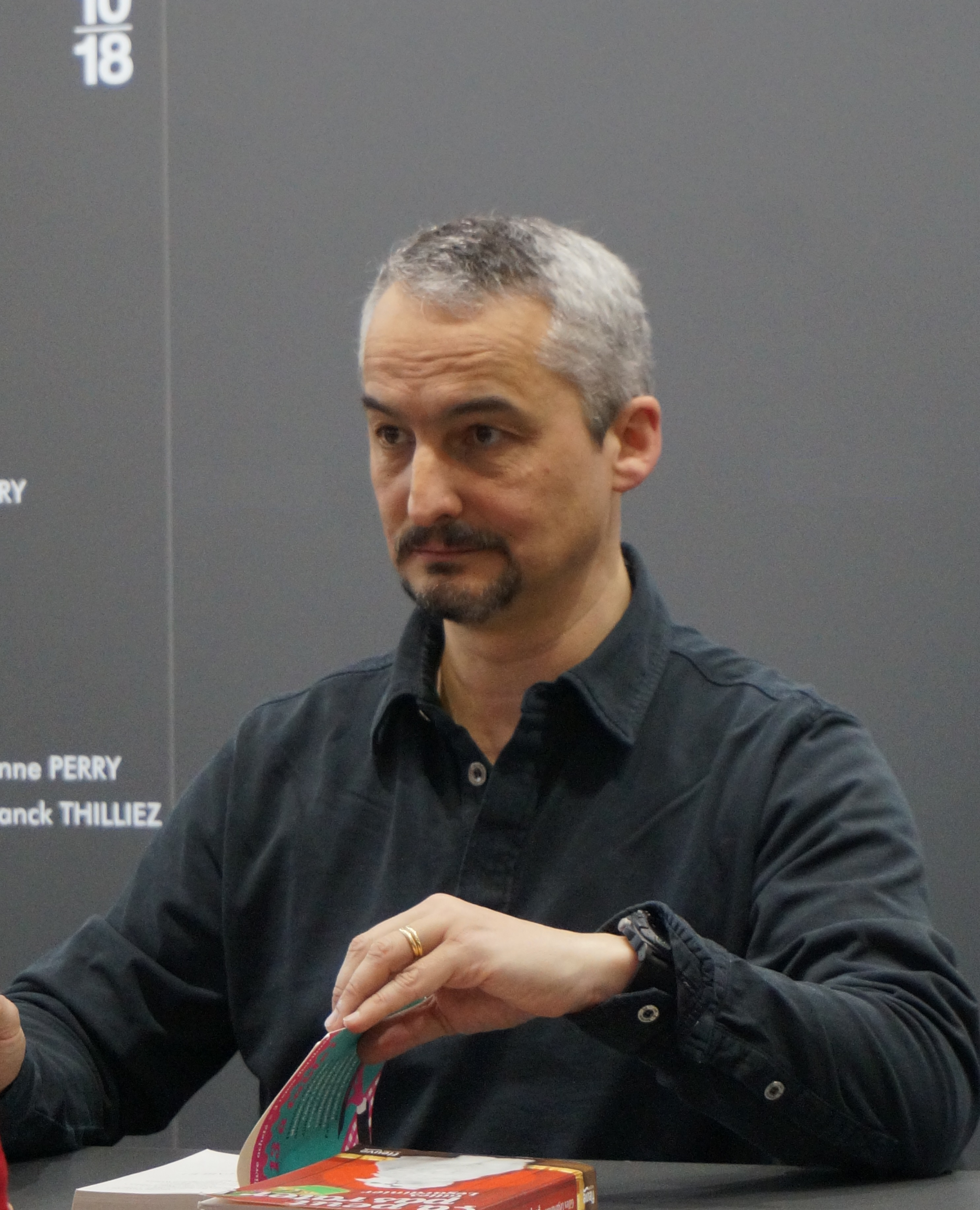 lors du salon du livre de 2015.